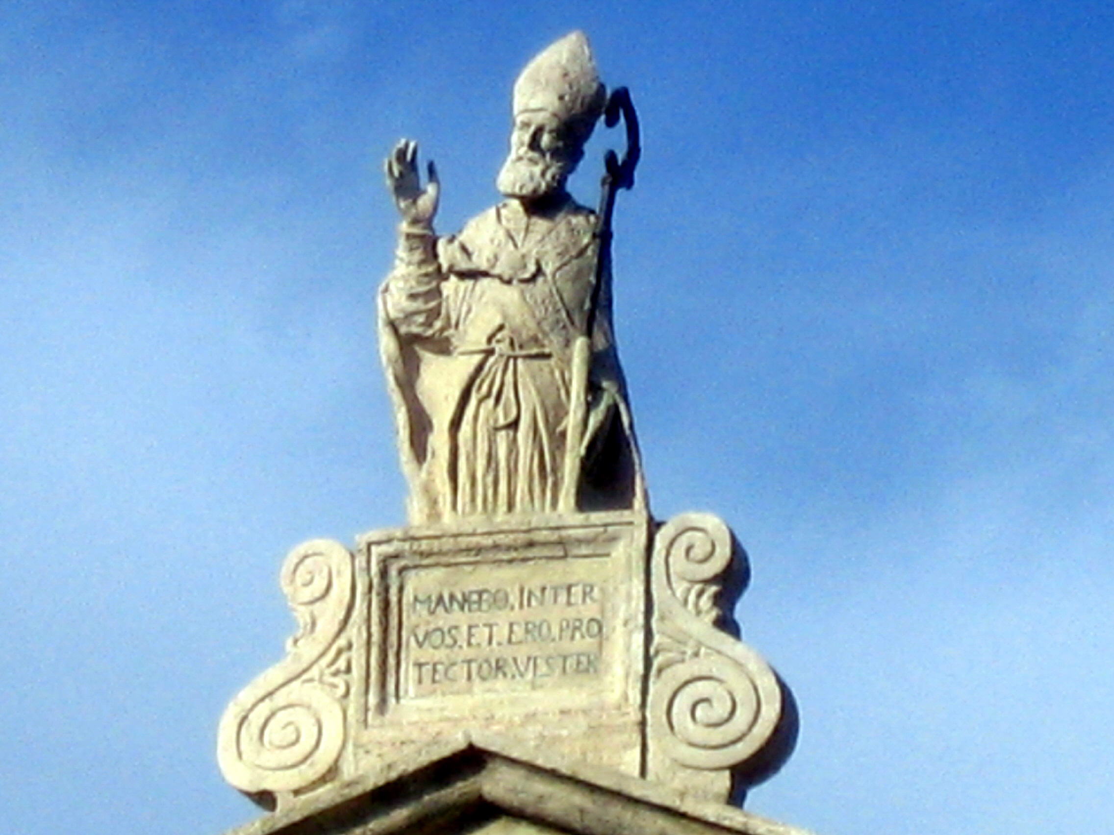 Orbetello, Toscana, Italia